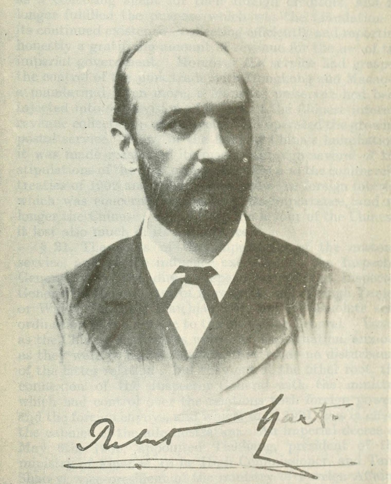 Robert Hart